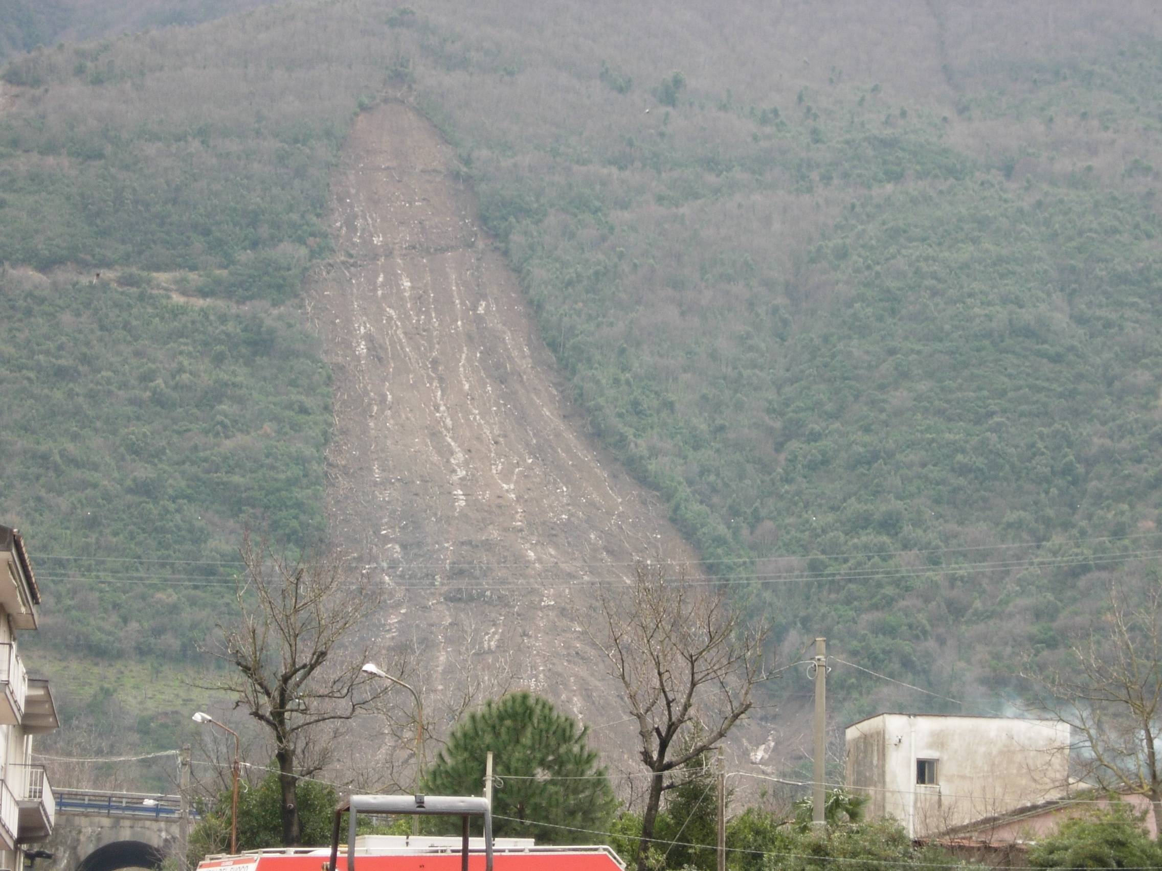 Foto della frana del 4 marzo 2005 a Nocera Inferiore